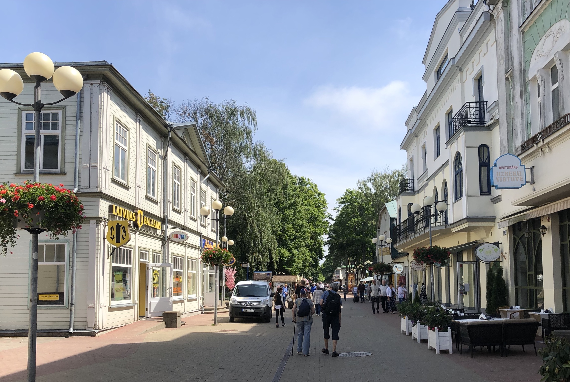 Johmenstraße in Riga-Strand 2018